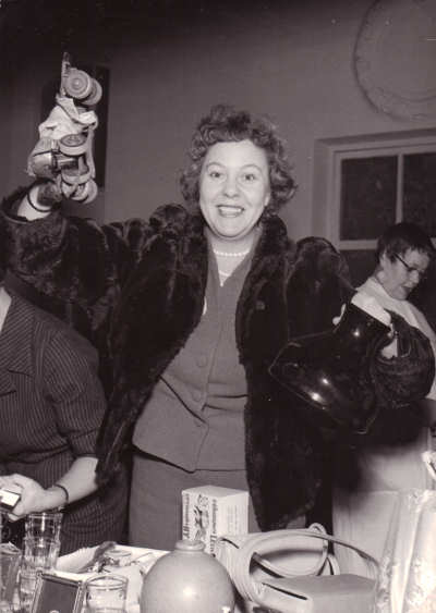 Näyttelijä Rauni Luoma Joulumarkkinoilla vuonna 1958.